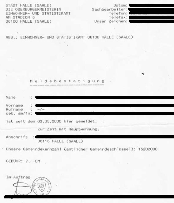 Meldebestätigung des Einwohner- und Statistikamts Halle (Saale)